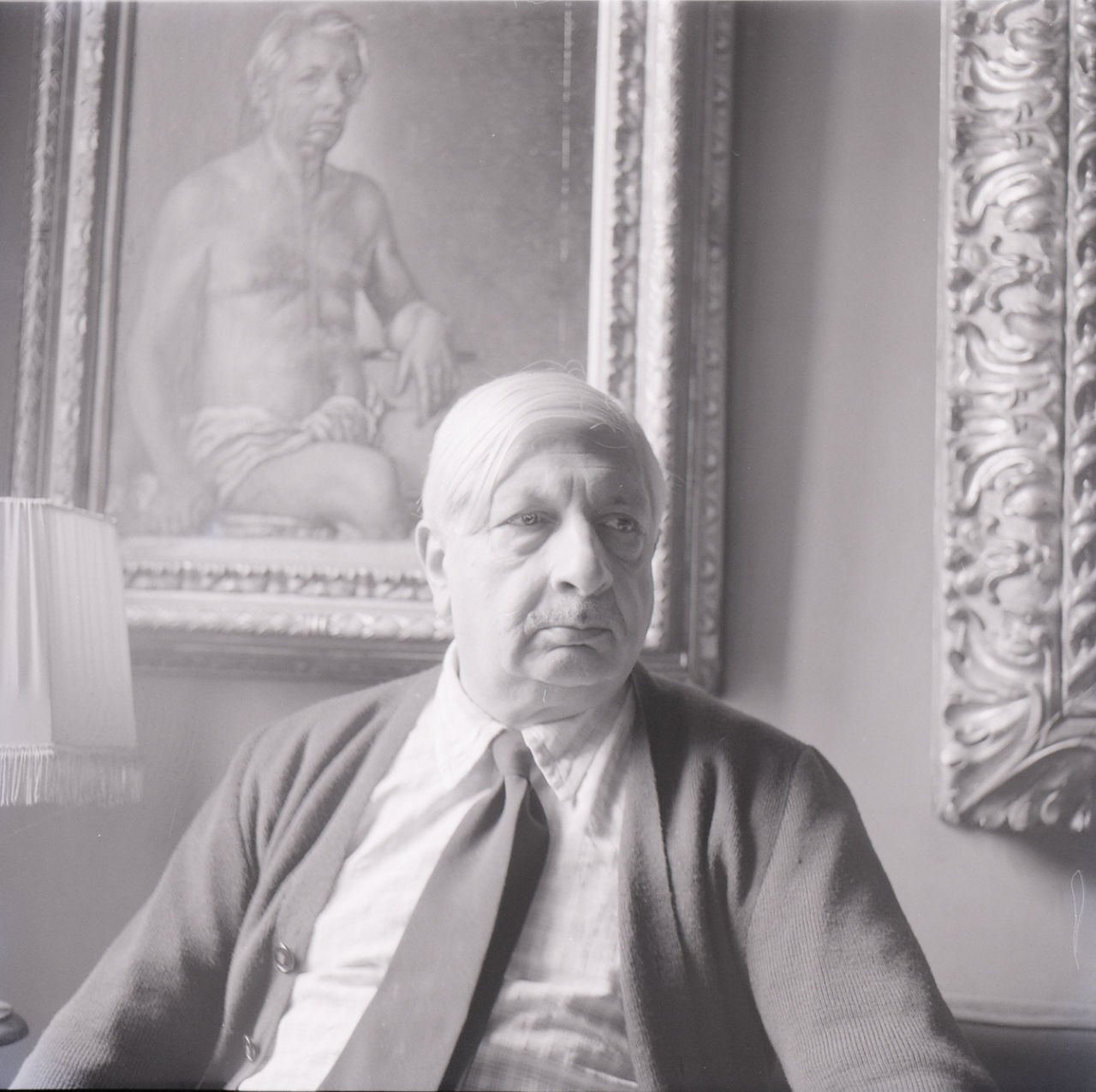 Servizio fotografico : Italia, 1970 / Paolo Monti. - Buste: 5, Fototipi: 5 : Negativo b/n, gelatina bromuro d'argento/ pellicola ; 6x6. - ((Serie costituita da 5 buste di carta, tenute insieme da una graffetta, identificate con i nn.: R4289, R4290, R4291, R4292, R4293. - Sulla busta R4084: "De Chirico". - Il negativo R4292 è l'artista Cardarelli. - Occasione: Documentazione in occasione della mostra di De Chirico e Dova